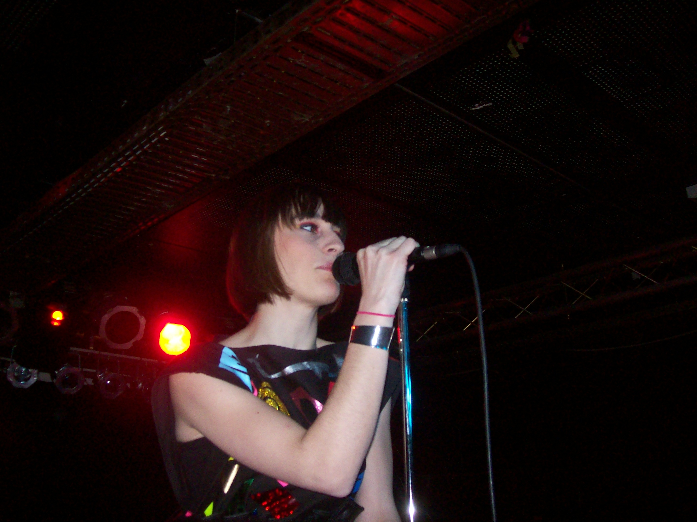 Yelle (Julie Budet bei einem Konzert in Dortmund)